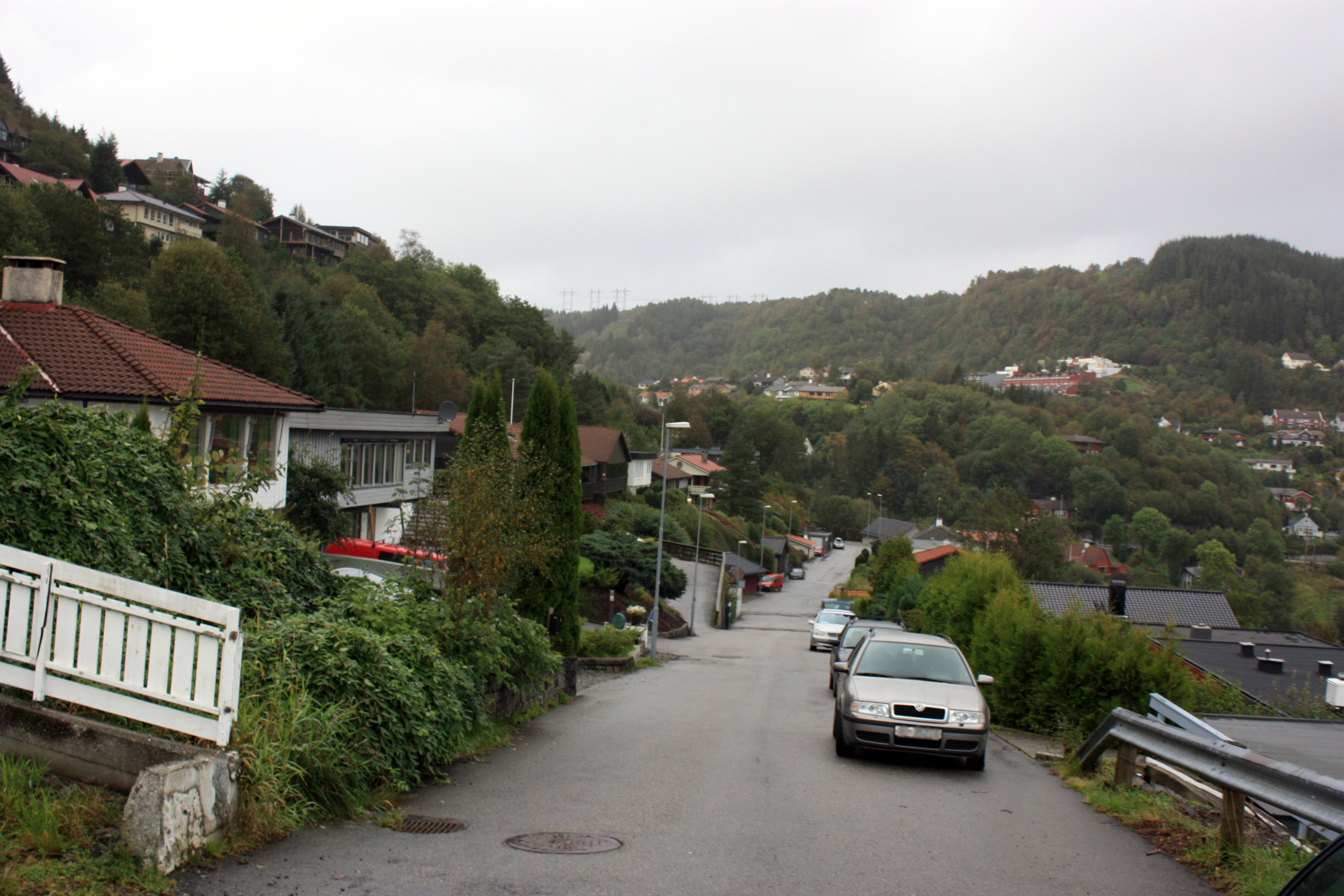 Hatlestad terrasse, Fana, Bergen.